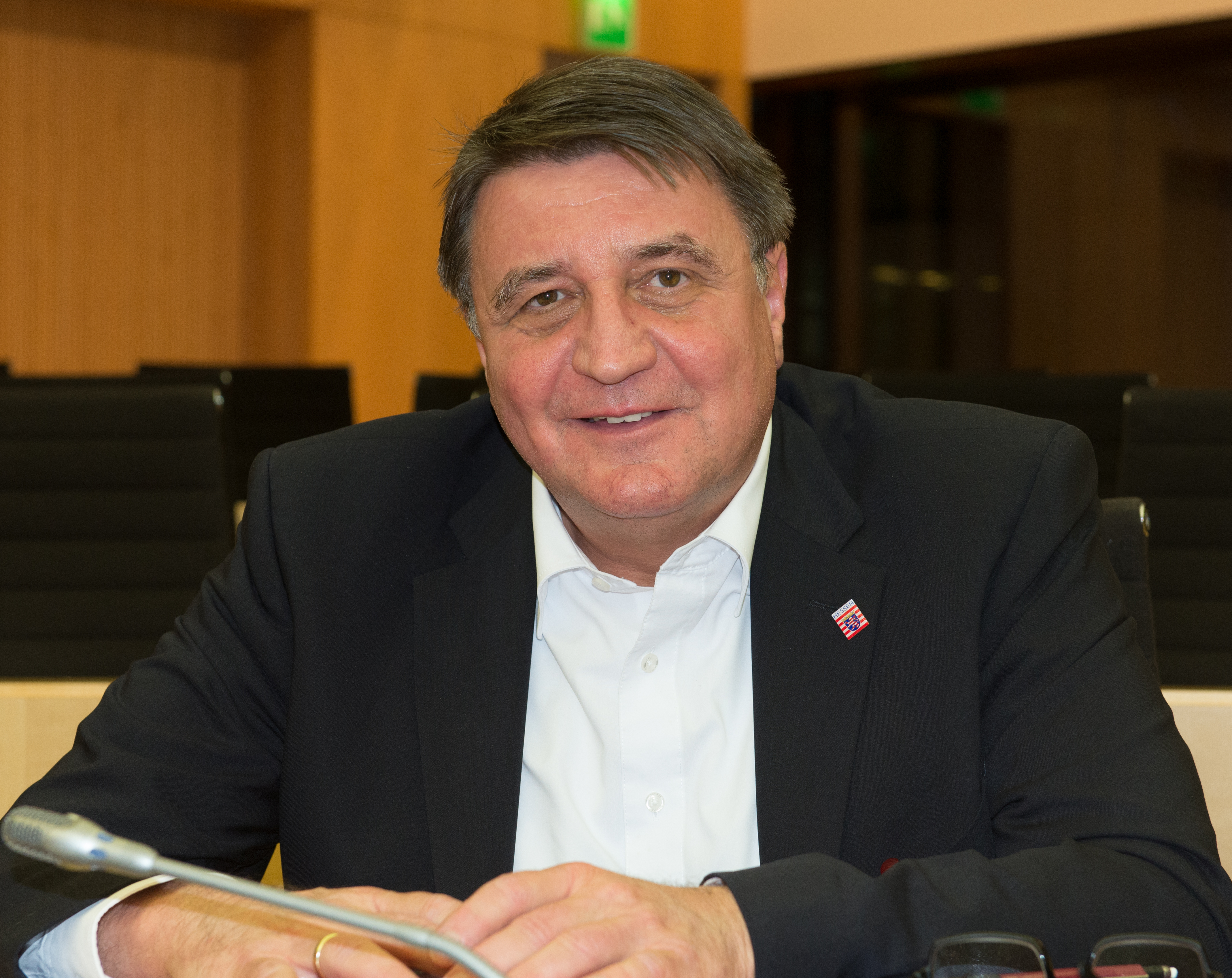 Wiki loves Parliaments im Hessischen Landtag am 4. Februar 2016 - Making Of